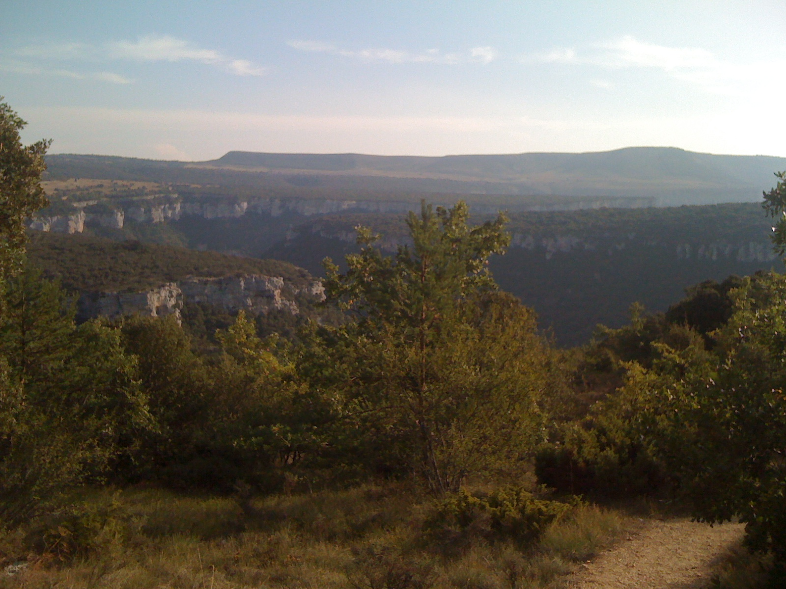 Cañon del Ebro (Parque natural Hoces del Ebro y Rudrón)